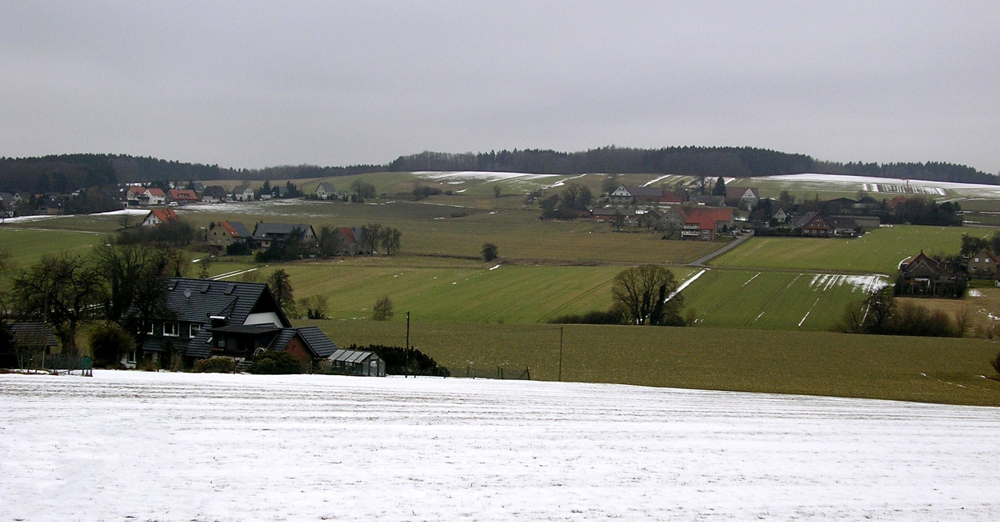 Ansicht von Büscherheide, einem Ortsteil von Bad Essen in Niedersachsen. Aufnahme erfolgte vom Südhang des Wiehengebirges an der Grenze zu Börninghausen.